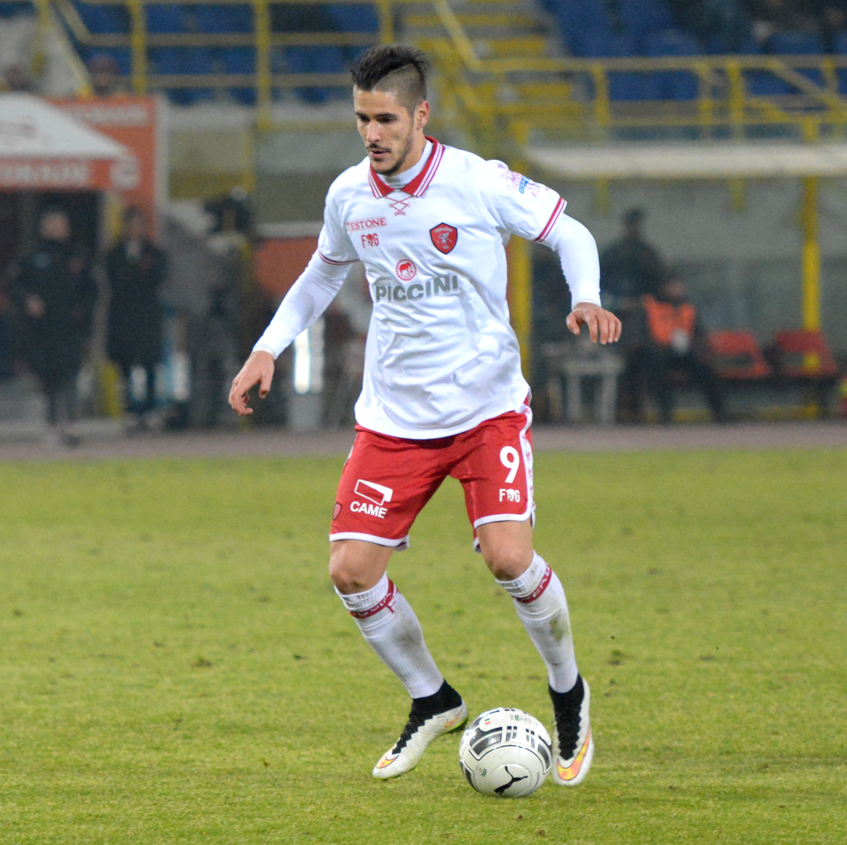 Diego Falcinelli, calciatore italiano, in azione con la maglia del Perugia.